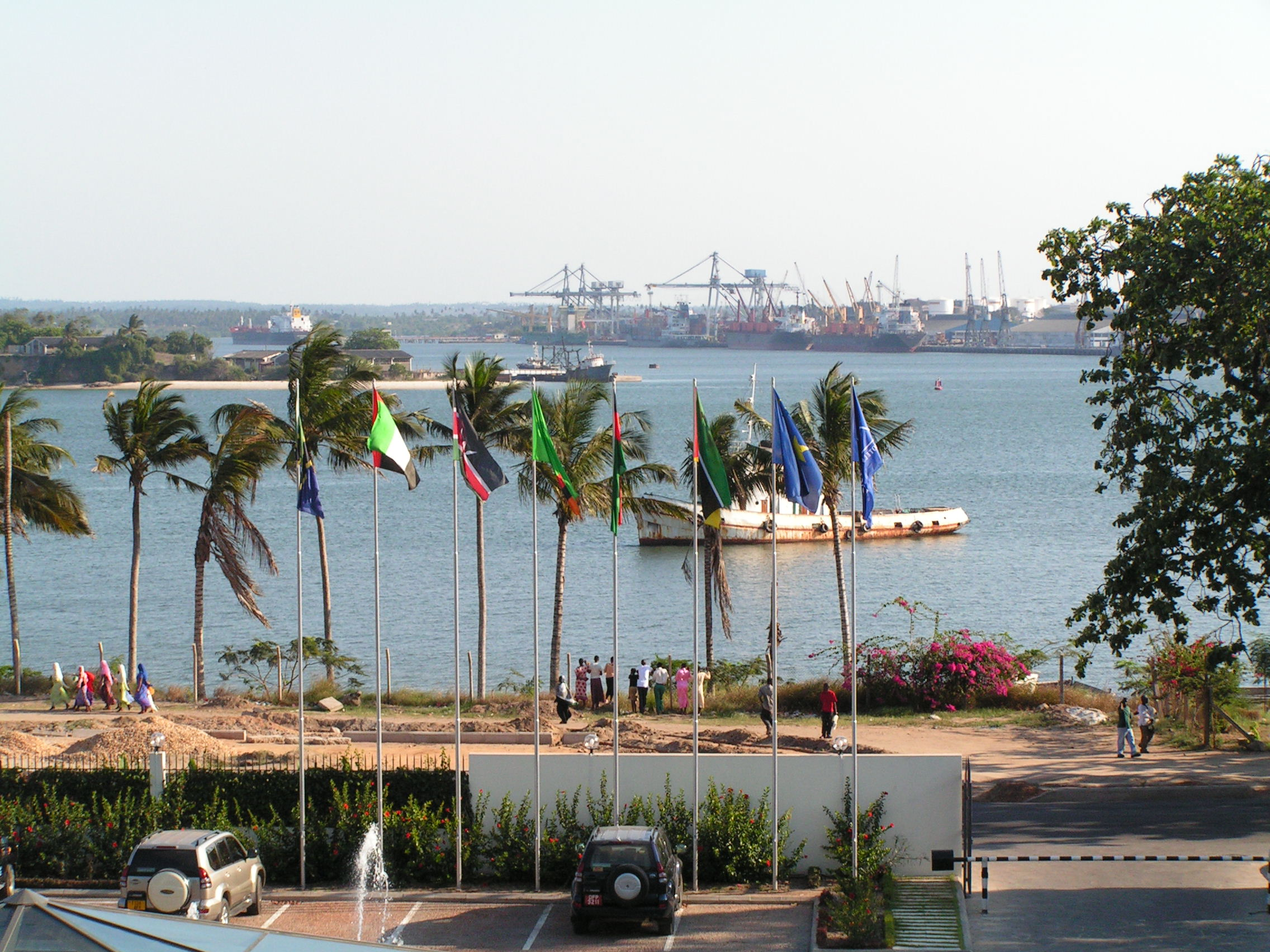 Hafen von Daressalam